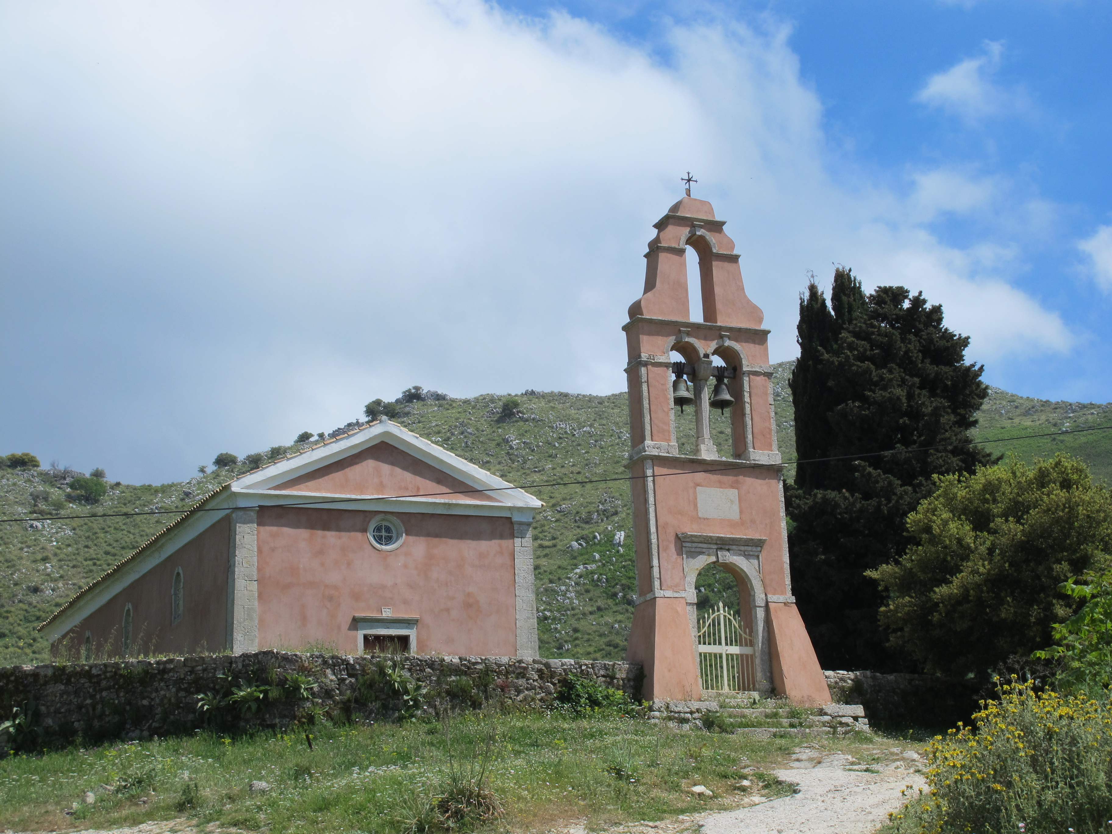 renovierte Kirche in Palaio Peritheia